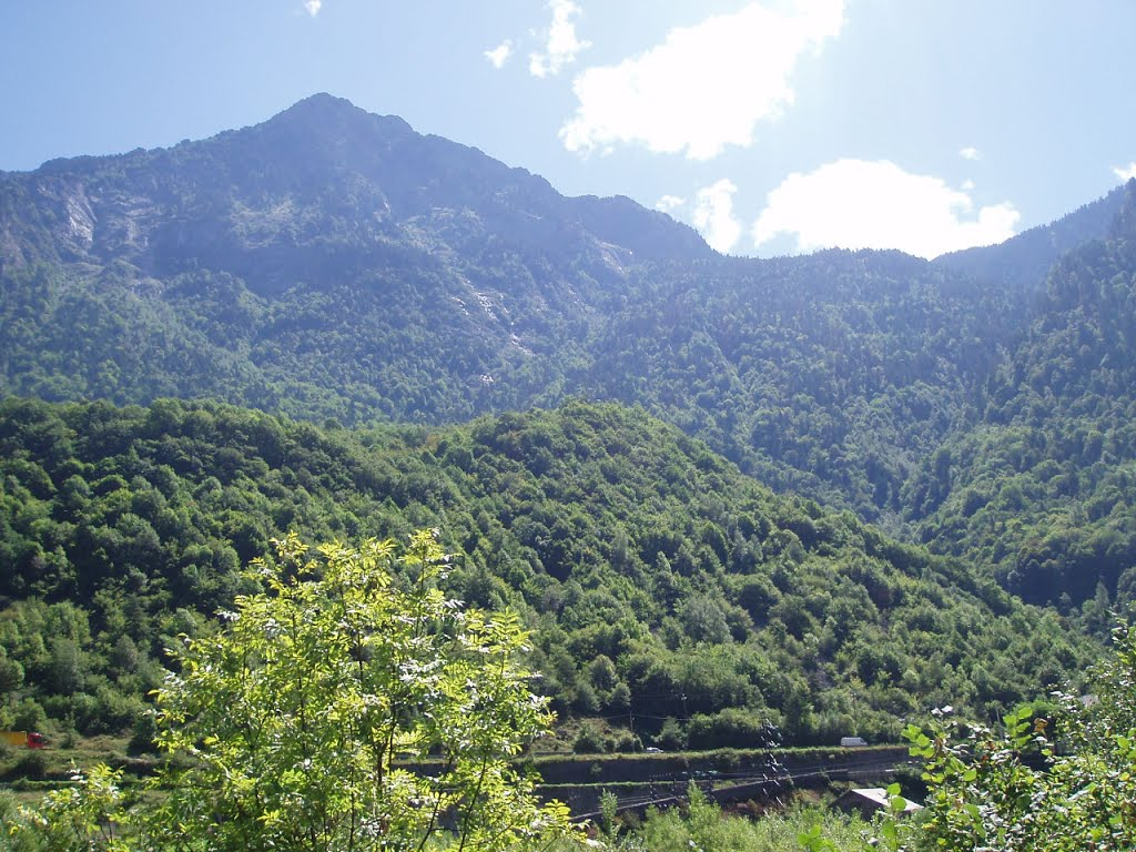 Livet-et-Gavet Massif du taillefer